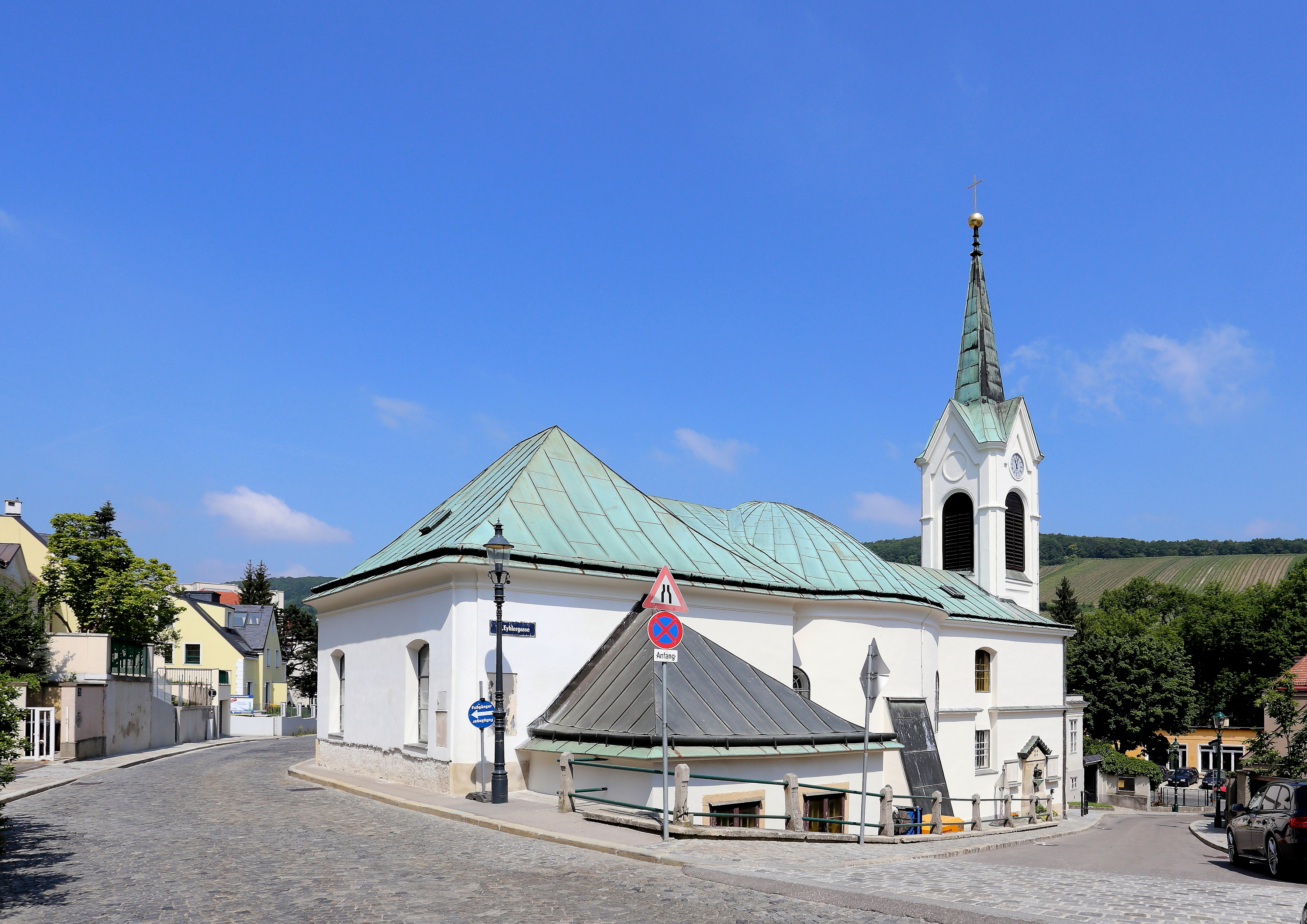 Südostansicht der katholischen Pfarrkirche hl. Rochus in Neustift am Walde, ein Ortsteil des Wiener Gemeindebezirkes Döbling.